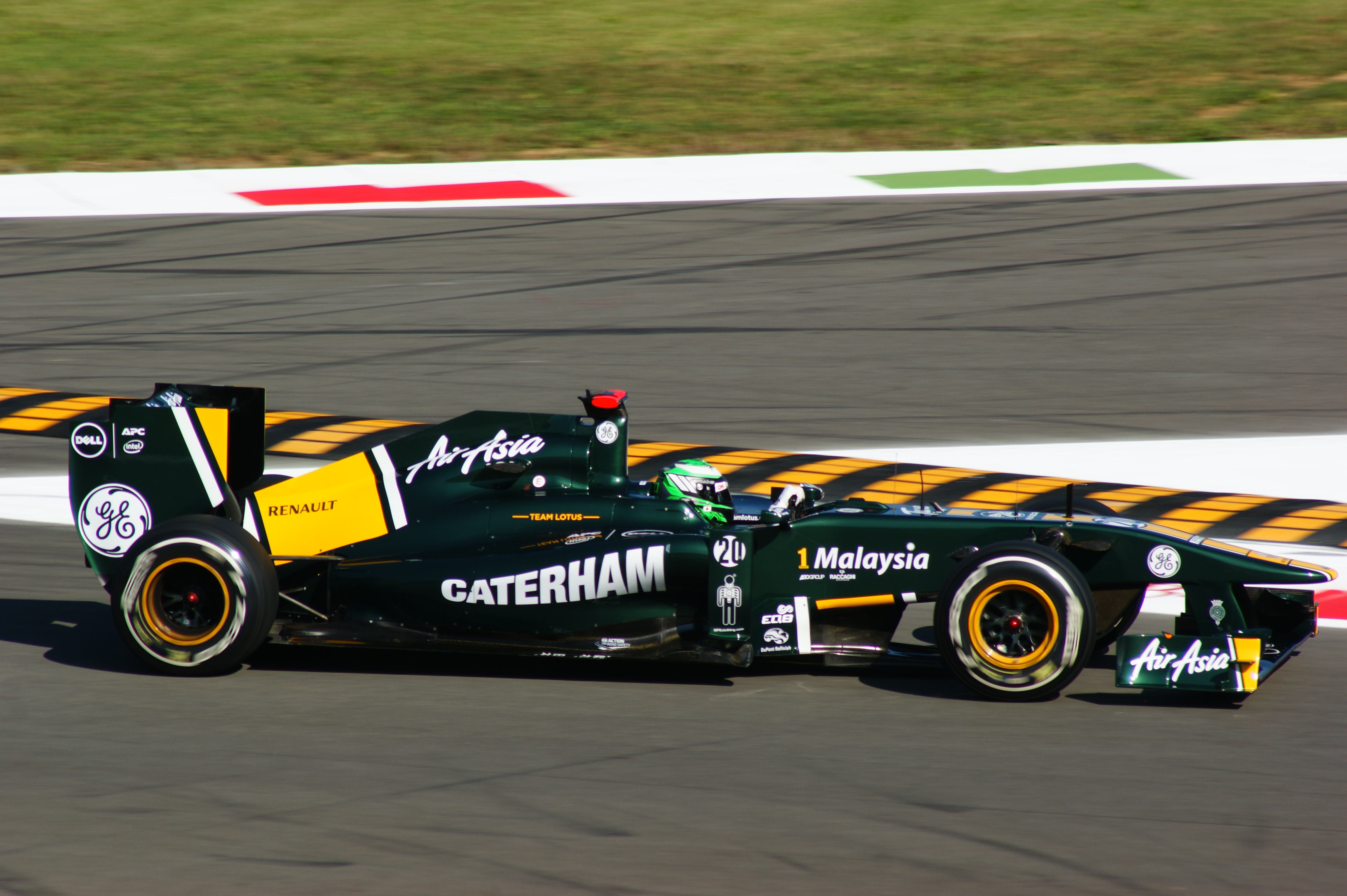 Heikki Kovalainen alla prima variante Monza 2011